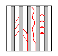 Zusammenstellung möglicher Zwischenfaserbruchformen. Sie treten nicht, wie im Bild gezeigt, gleichzeitig auf.